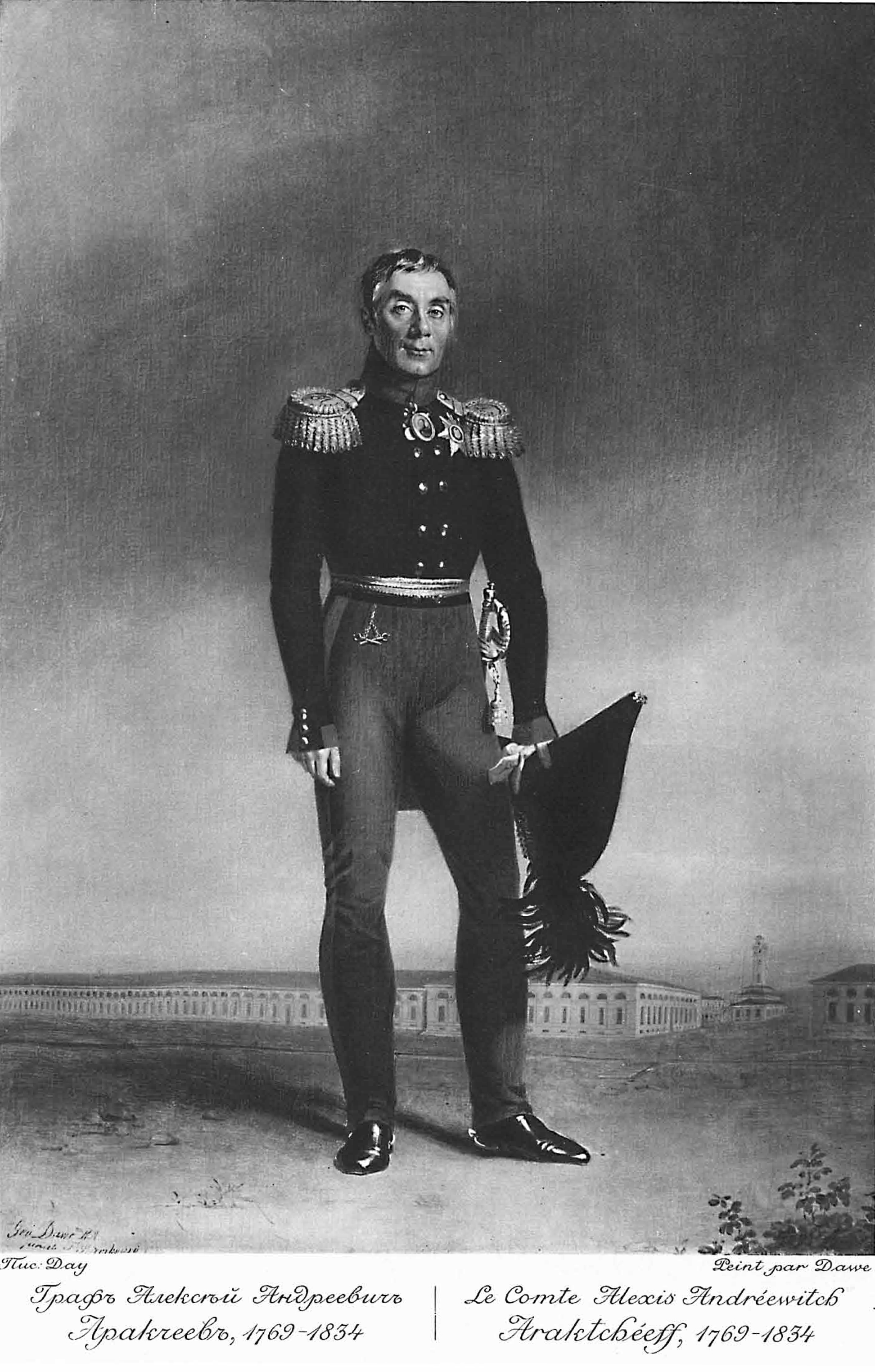 Алексей Андреевич Аракчеев. Оригинал. Худ. Дж.Доу, 1823, ГРМ